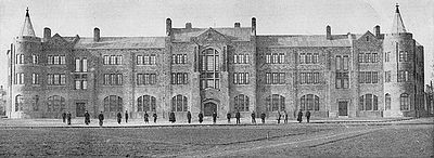 The SMR office of Changchun（长春满铁事物所）